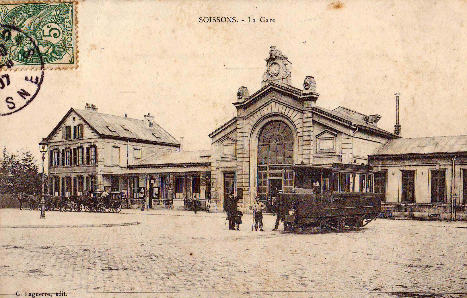 Carte postale ancienne éditée par G. Laguerre : SOISSONS - La Gare